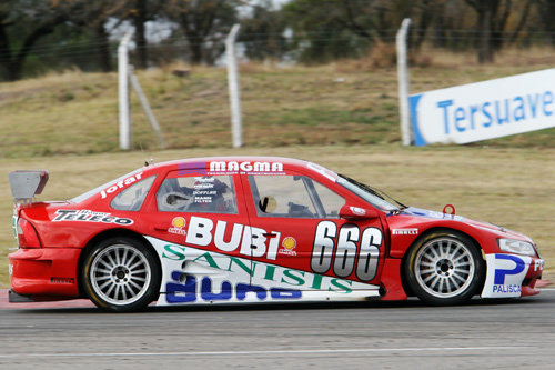 Chevrolet Vectra II de TRV6 que fuera utilizado hasta la temporada 2009. Piloto: Gustavo Tadei